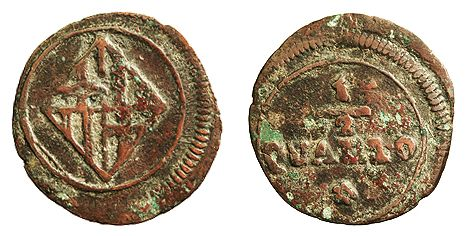 Moneda de mig quarto encunyada a Barcelona durant el regnat de Josep Bonaparte. En coure. Pertany a una sèrie emessa entre 1808 i 1814.